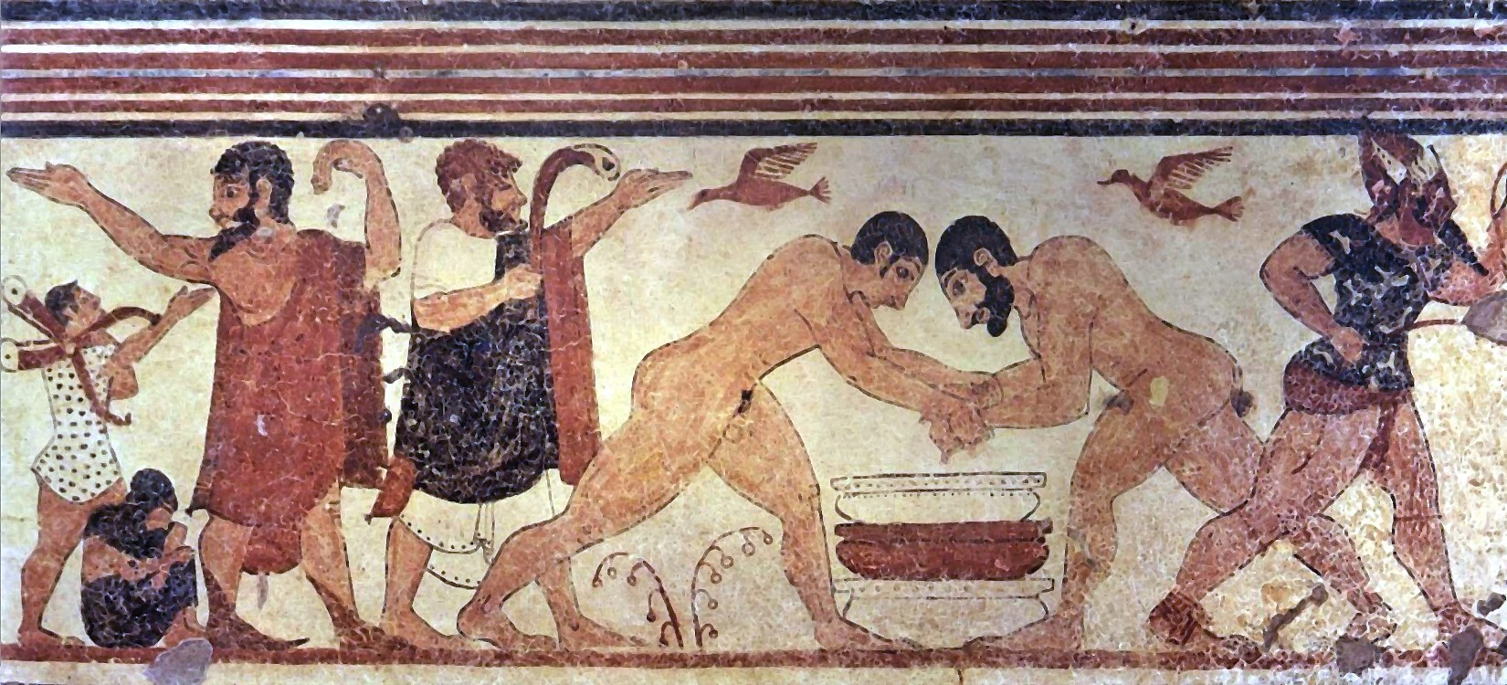 tomba degli auguri, Tarquinia, Italia